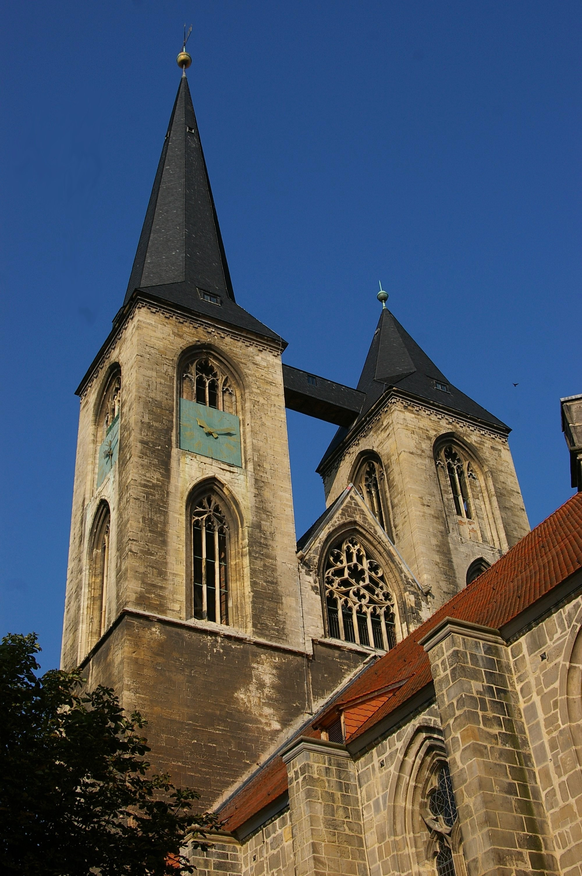 Halberstadt - Martinikirche - die ungleichen Türme